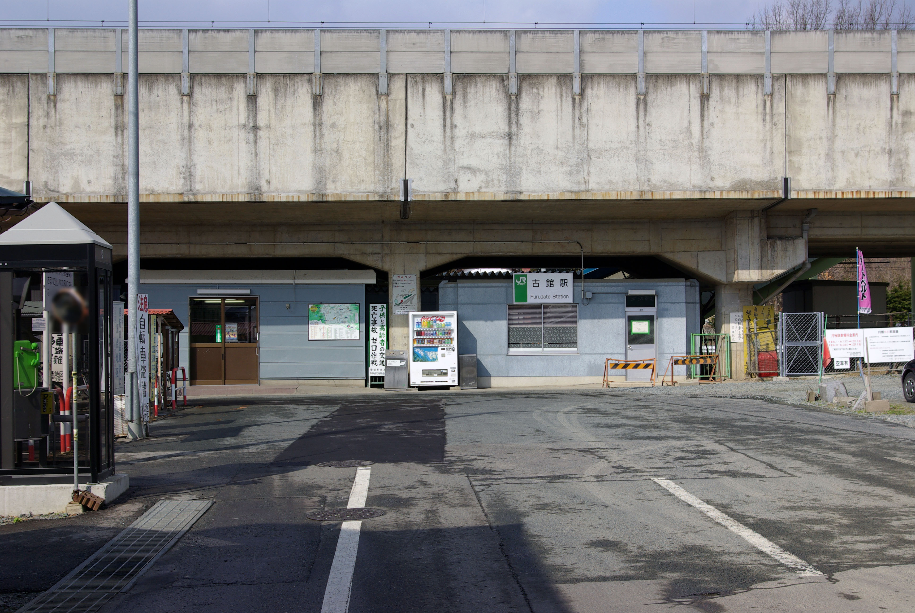 JR東北本線古館駅